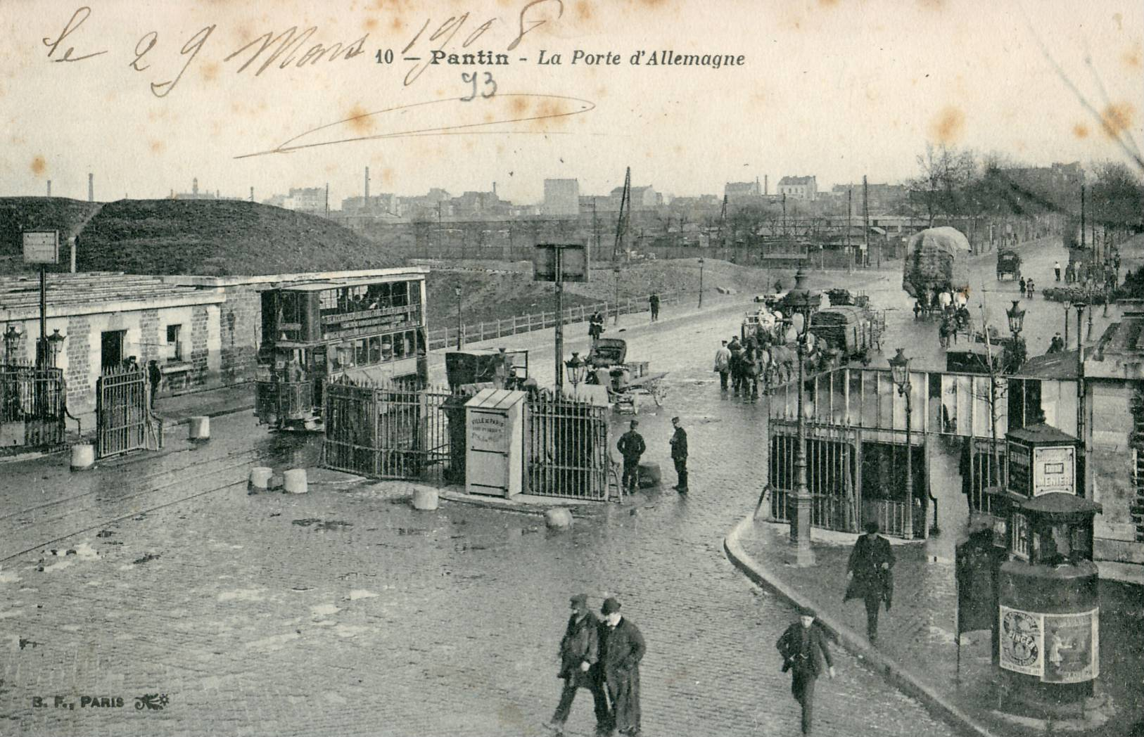 Carte postale ancienne éditée par BF à Paris, N°10 PANTIN : la Porte d'Allemagne (aujourd'hui la Porte de Pantin) On distingue un tramway (probablement de l'Est Parisien) franchissant les fortifications de Paris